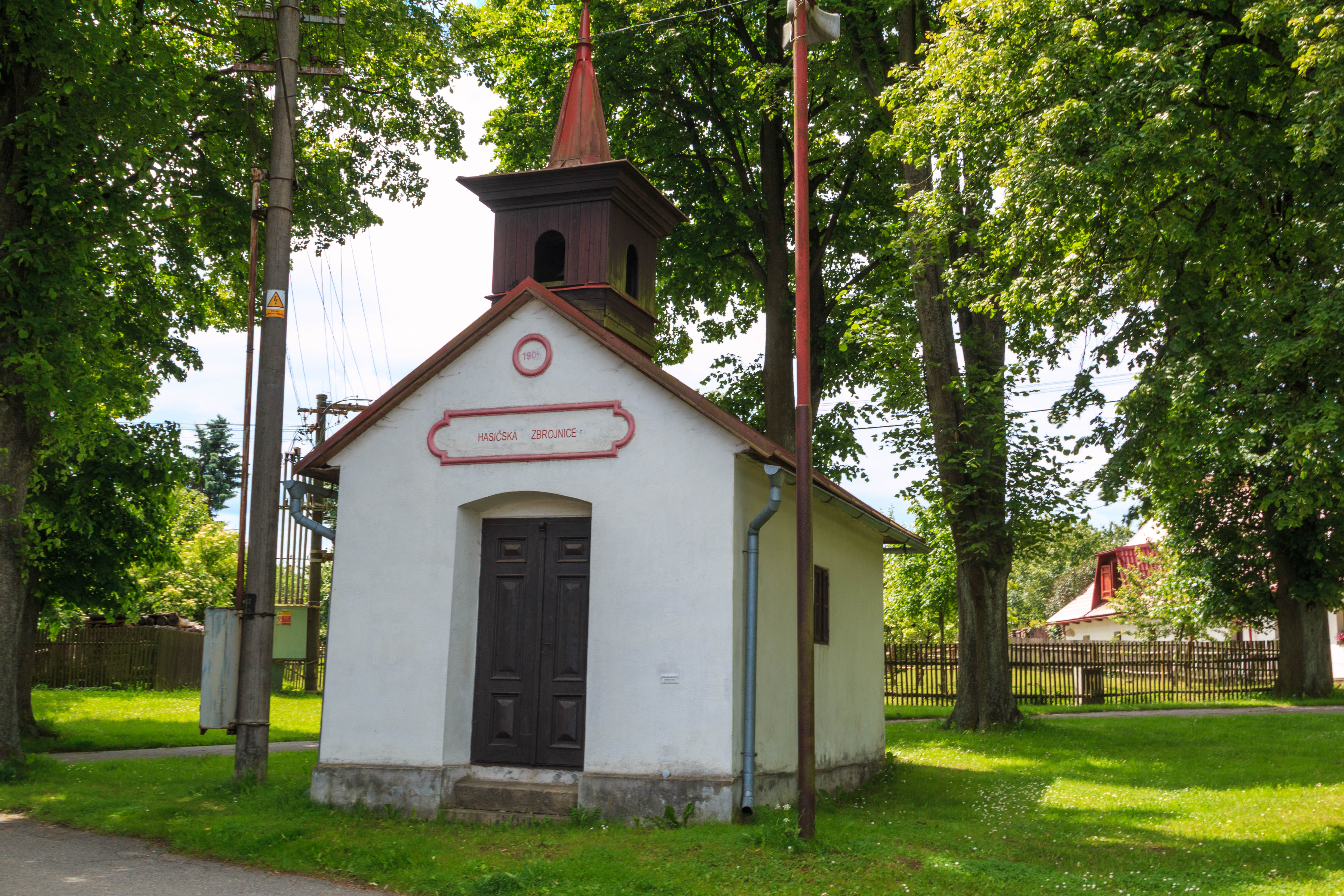 Kadovská kaple